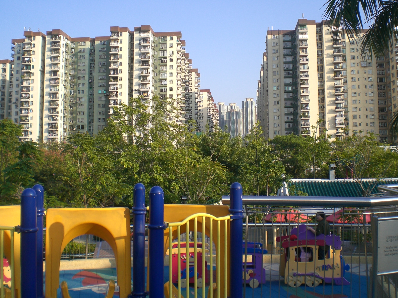 美孚新邨 Mei Foo Sun Chuen